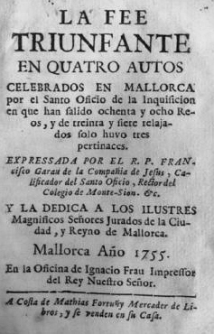 Portada interior de la reedició de la Fe triunfante el 1755